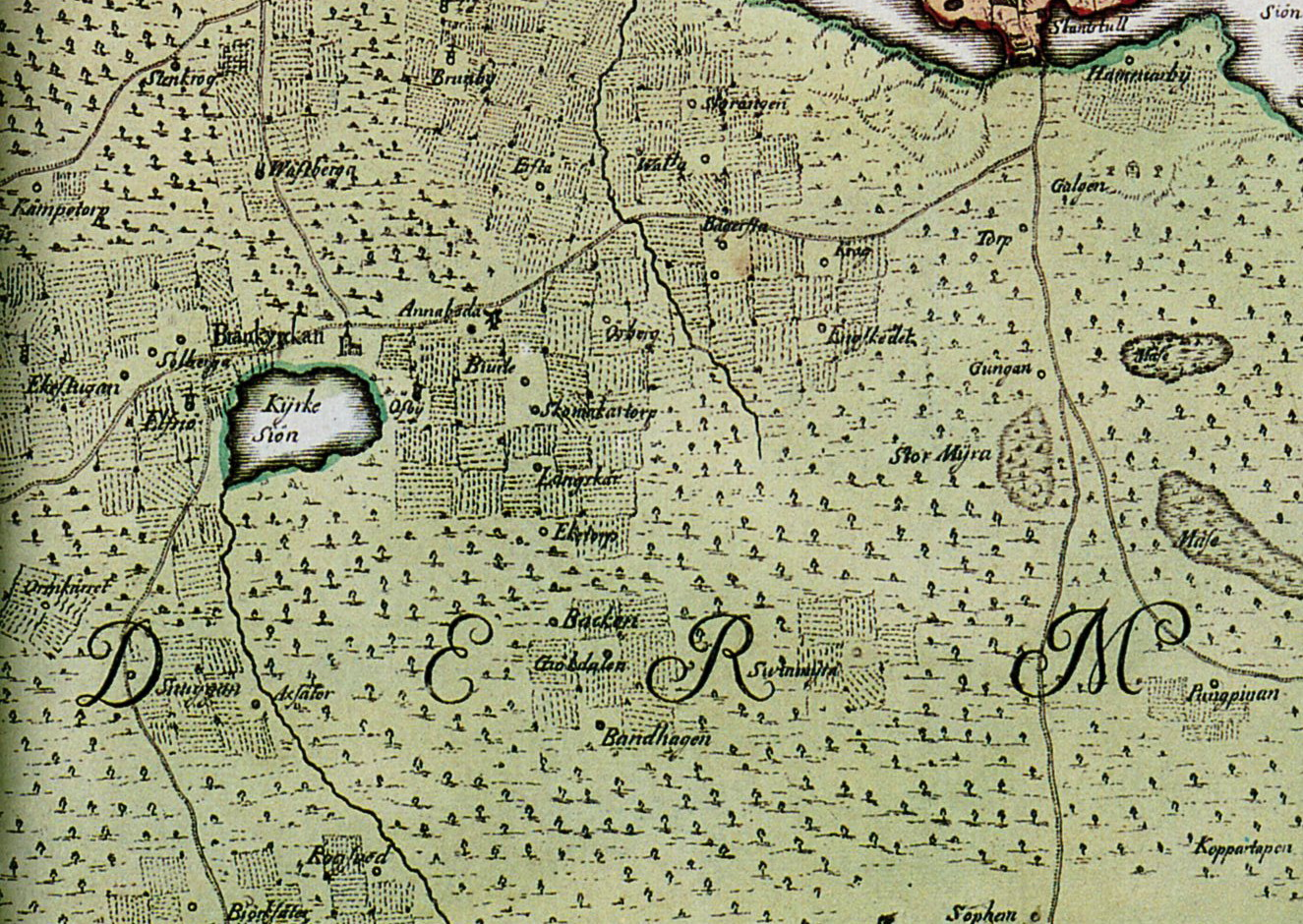 Del av "Charta Öfwer Stockholms Stads Belägenhet" visande dagens sydvästra Strockholm